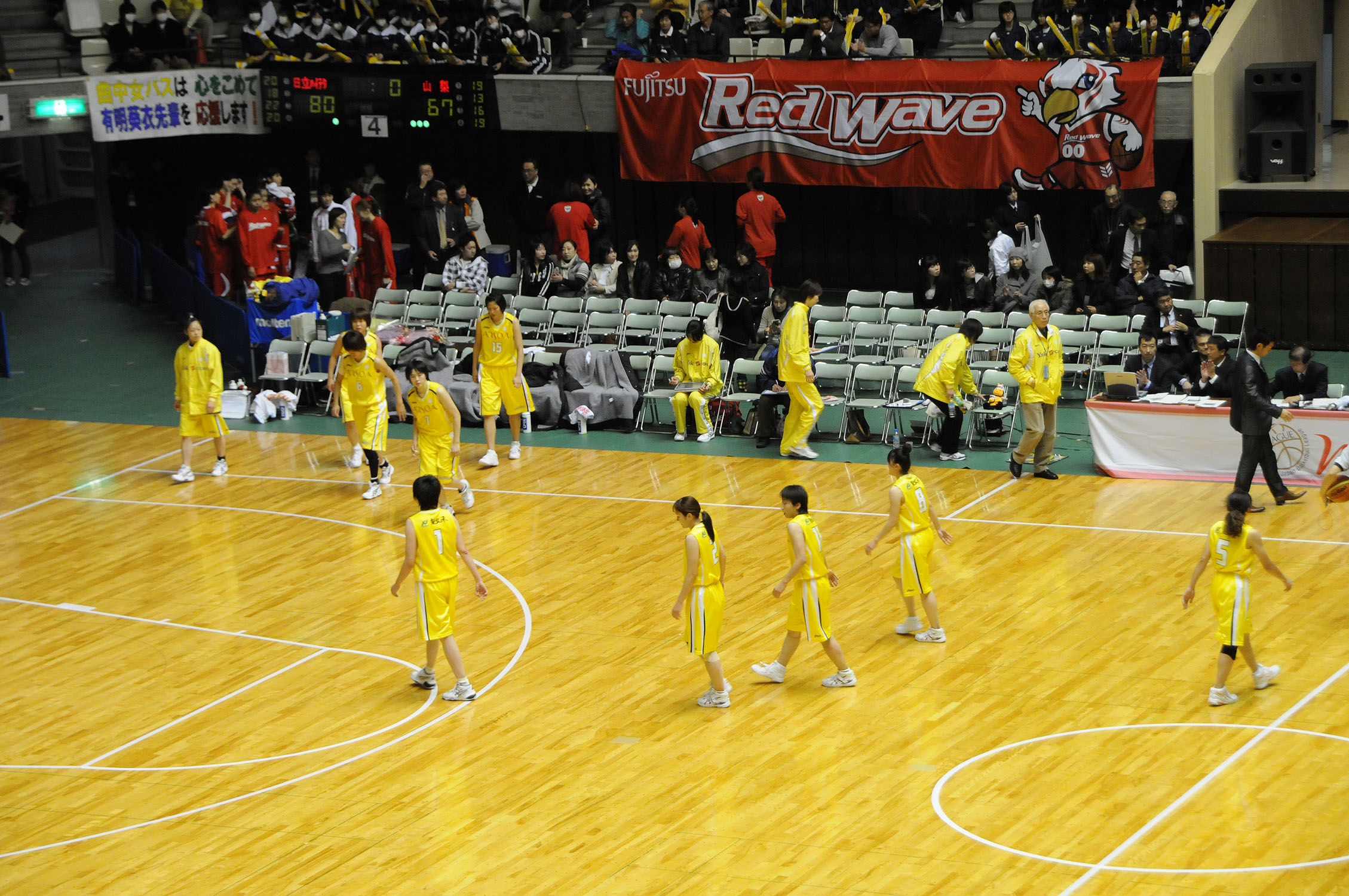 山梨クィーンビーズ。秋田県立体育館で。